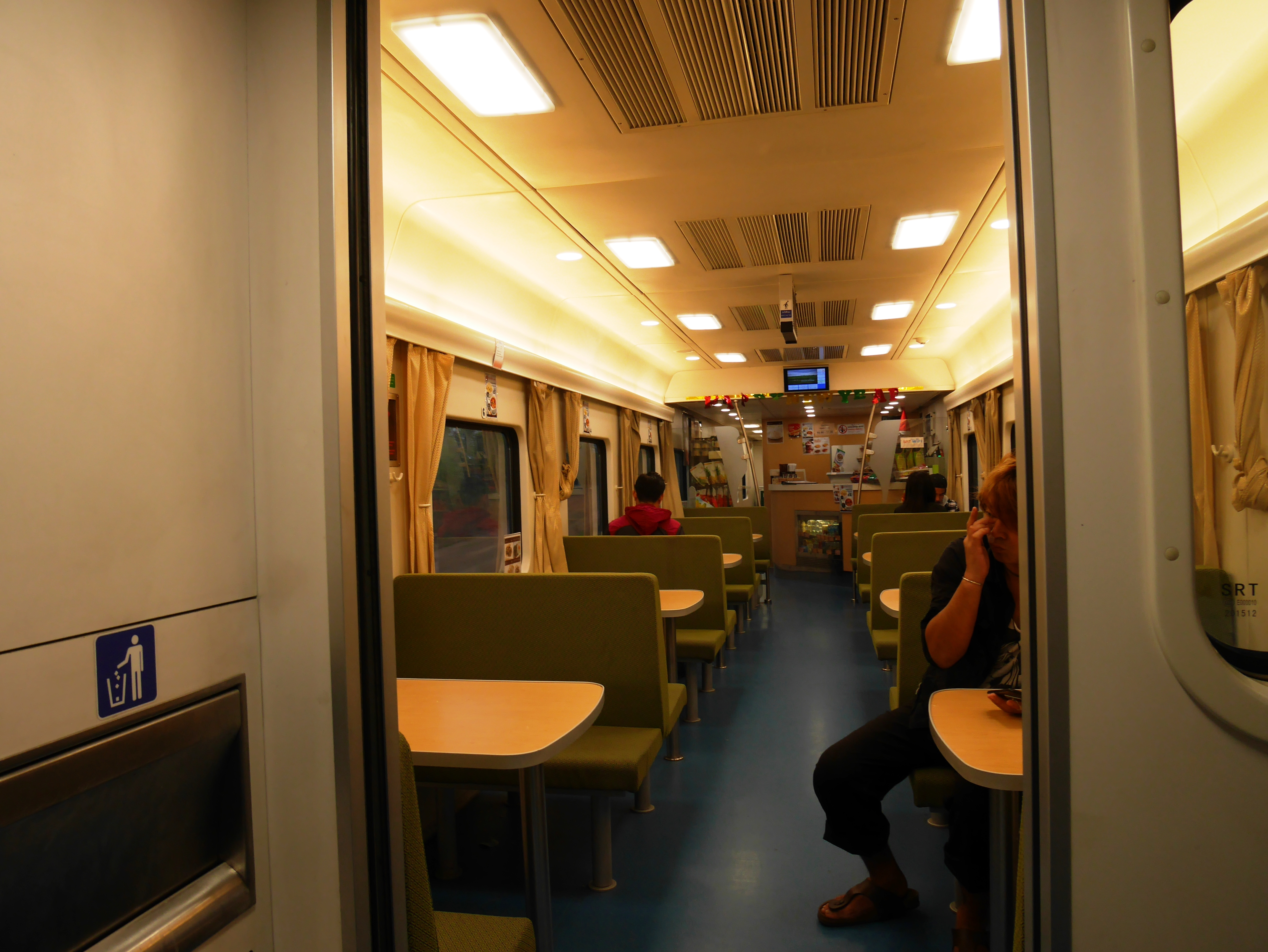 タイ国鉄の食堂車。2016年導入の中国中車製。但し、厨房はなく、フードは予め調理済みのをレンジでチンして提供しているので、食堂車というより売店車。深夜は営業休止する。